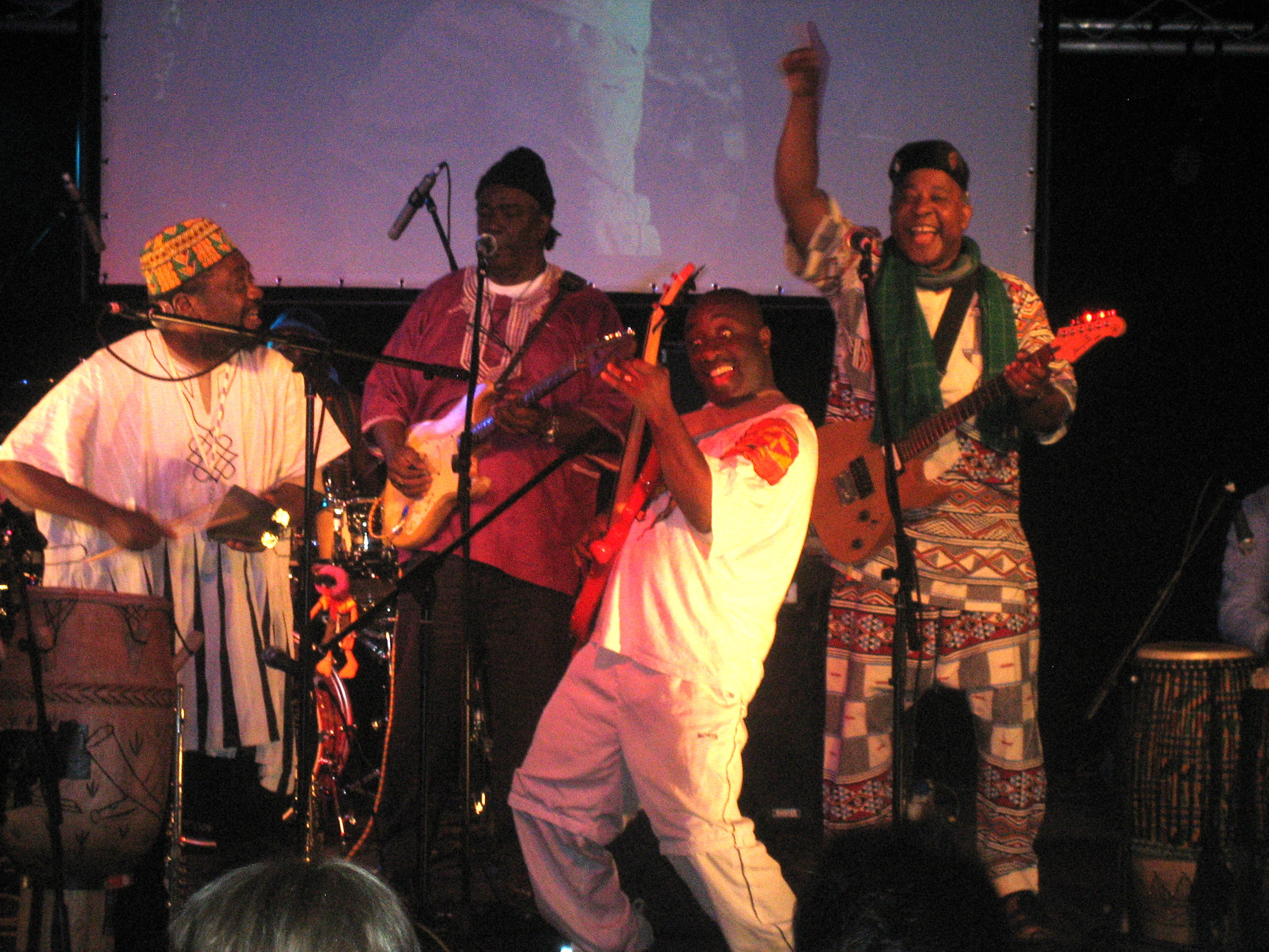 Osibisa, Wallingford Bunkfest 2008